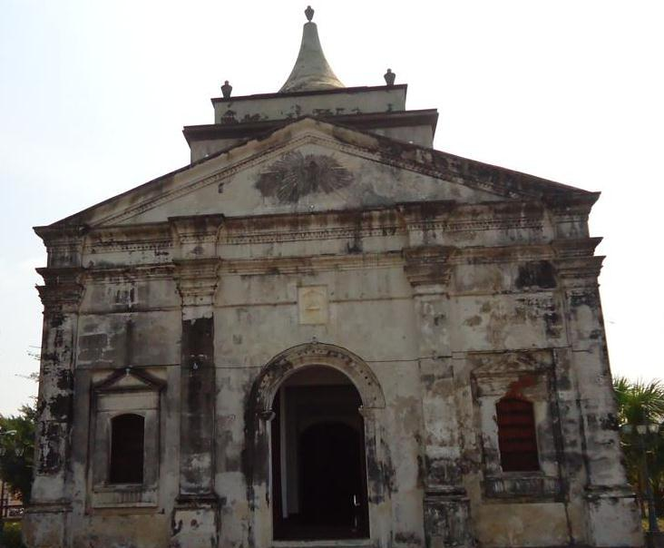 San Felipe iglesia León, Nicaragua por Richard Weiss